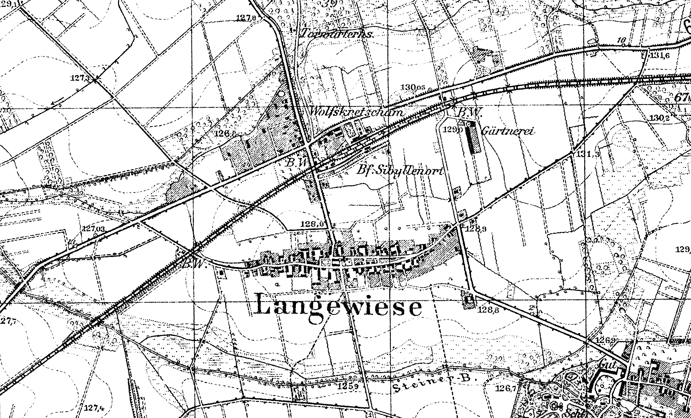 wieś Długołęka (województwo dolnośląskie) na mapie